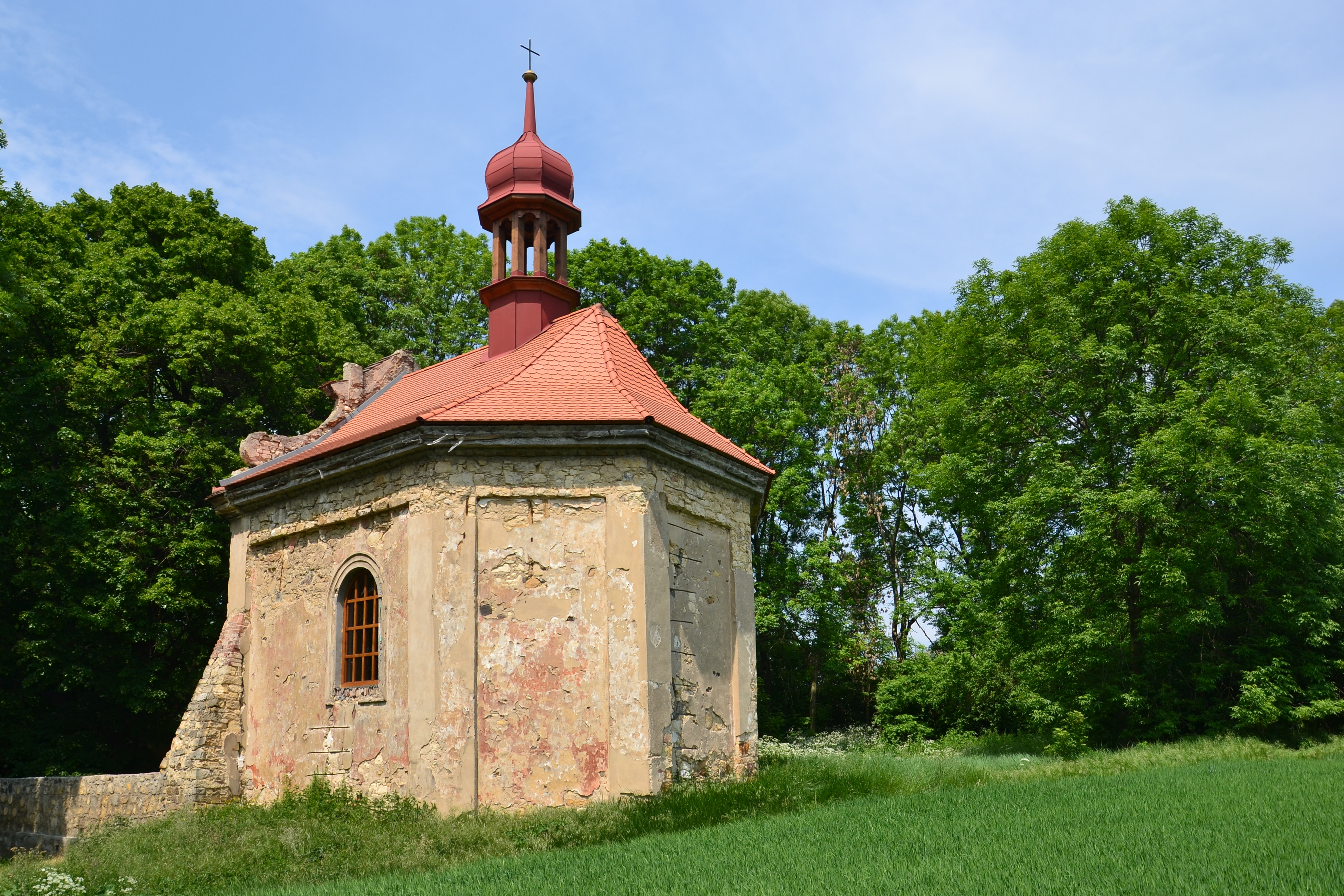 Kaple svatého Víta, S okraj obce, Sinutec, Sinutec.